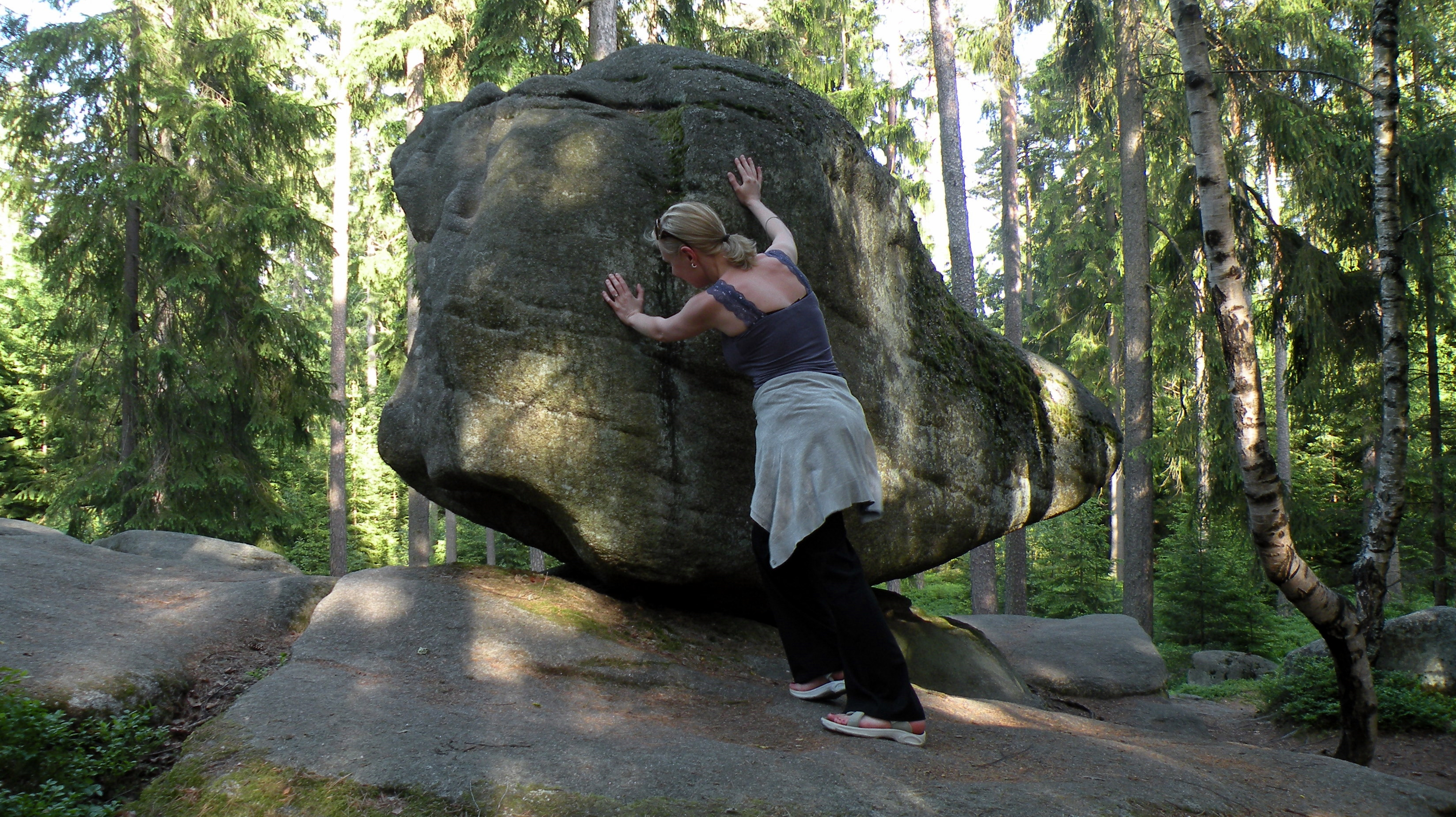 Naturdenkmal Hängender Stein im Naturpark Heidenreichsteiner Moor